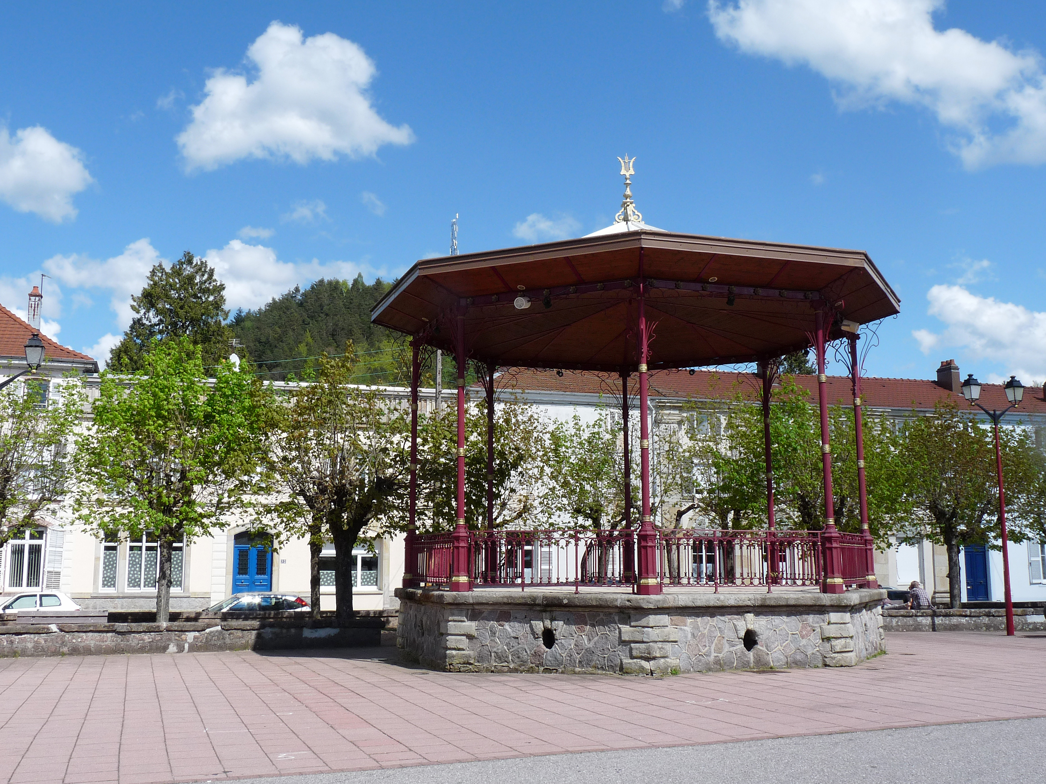 Bruyères (Vosges) : Kiosque sur la place Stanislas